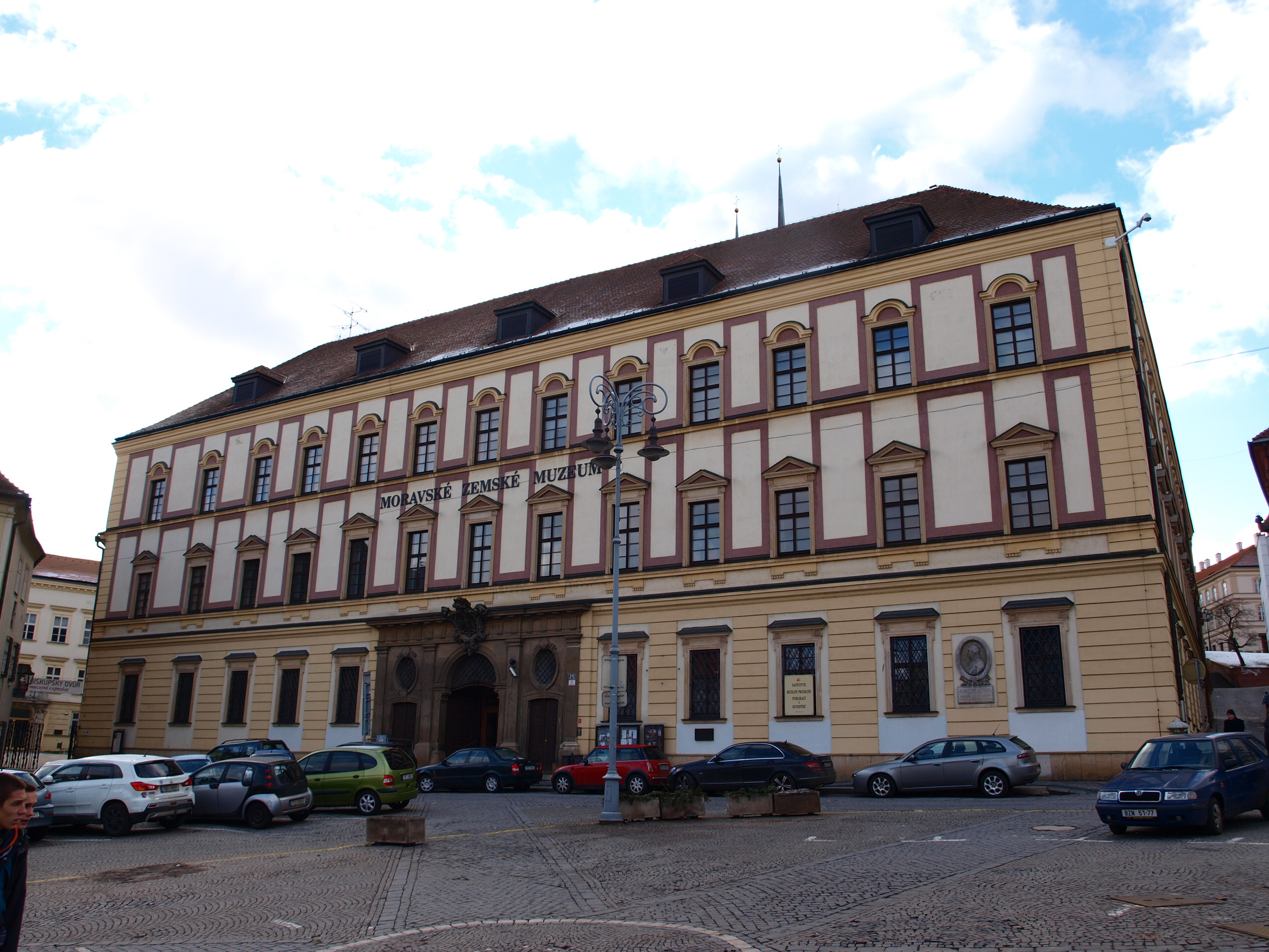 Dietrichsteinský palác, Brno